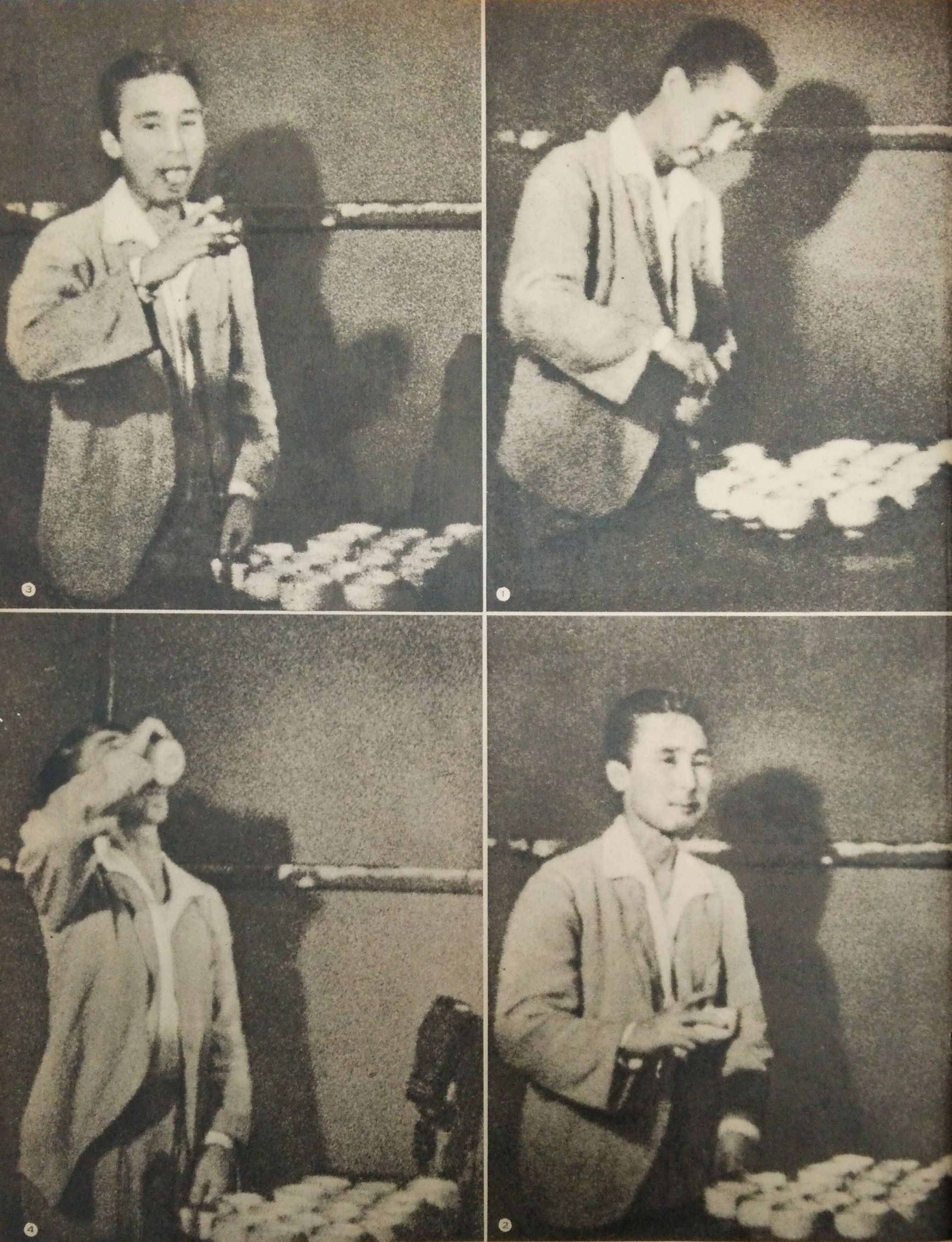 帝銀事件の犯行を再現させられる、容疑者の平沢貞通（警視庁作成トーキーフォルムの一場面）